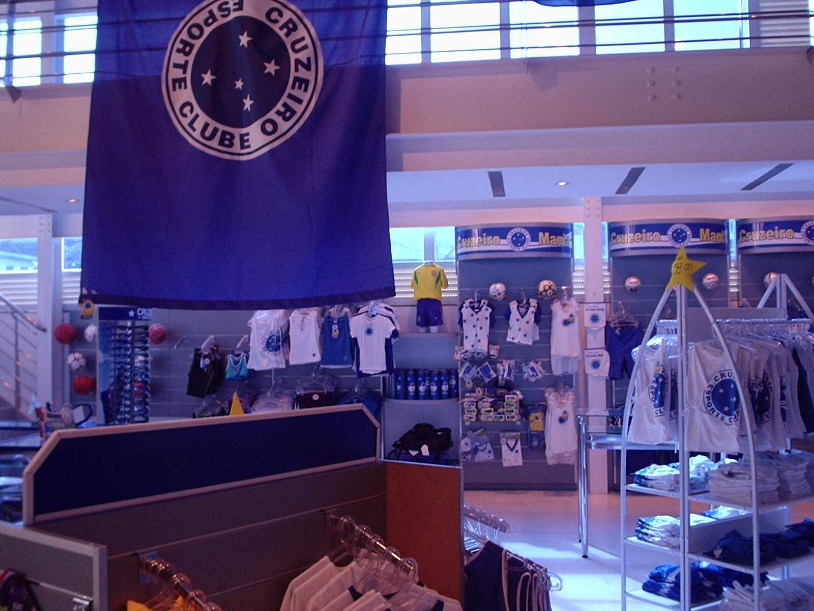 Interior sight of the Cruzeiro EC's Official Store, in Belo Horizonte, Brazil. Vista interior da Loja do Cruzeiro, em Belo Horizonte, Brasil.